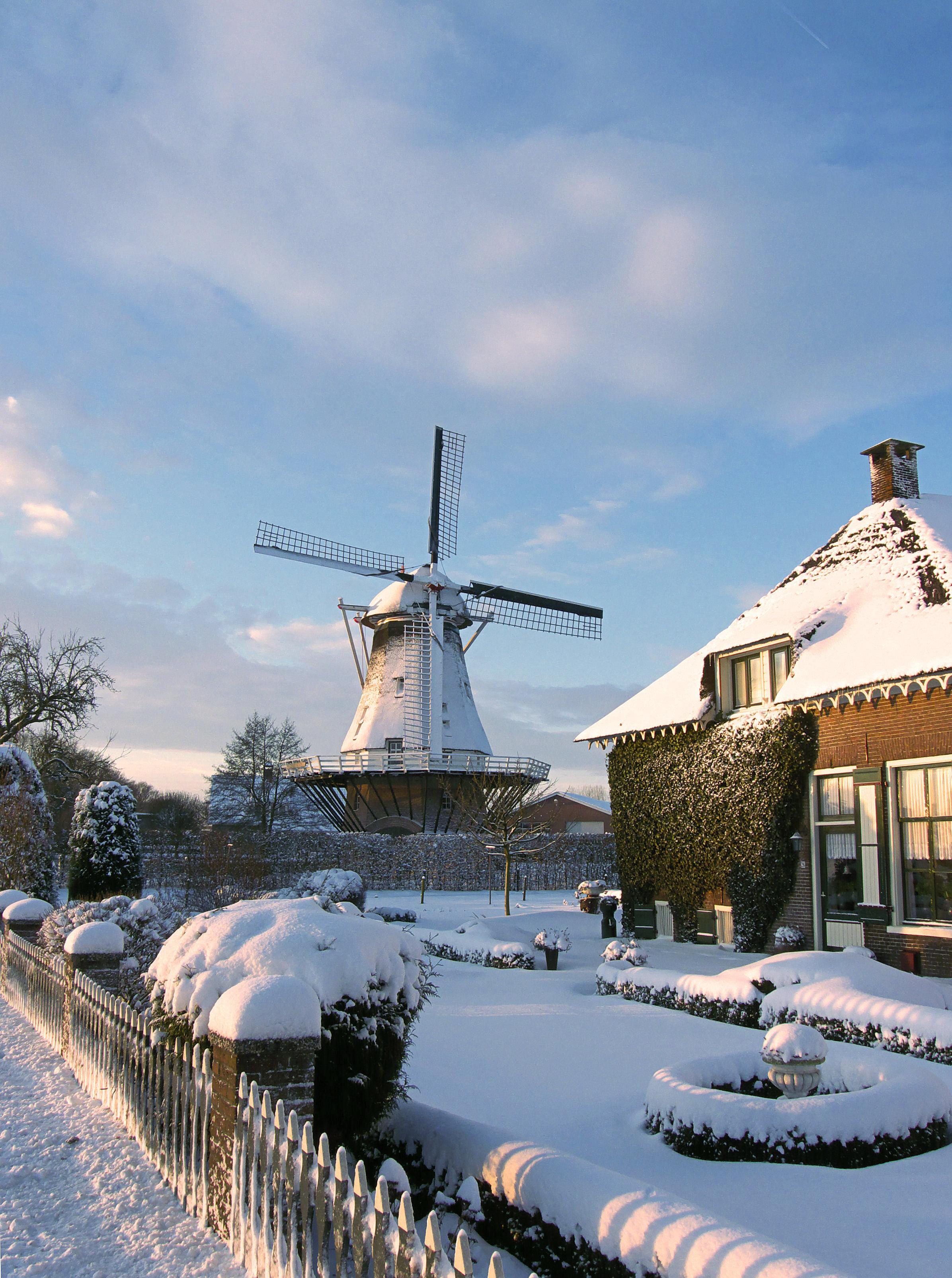 Walderveense molen in de sneeuw